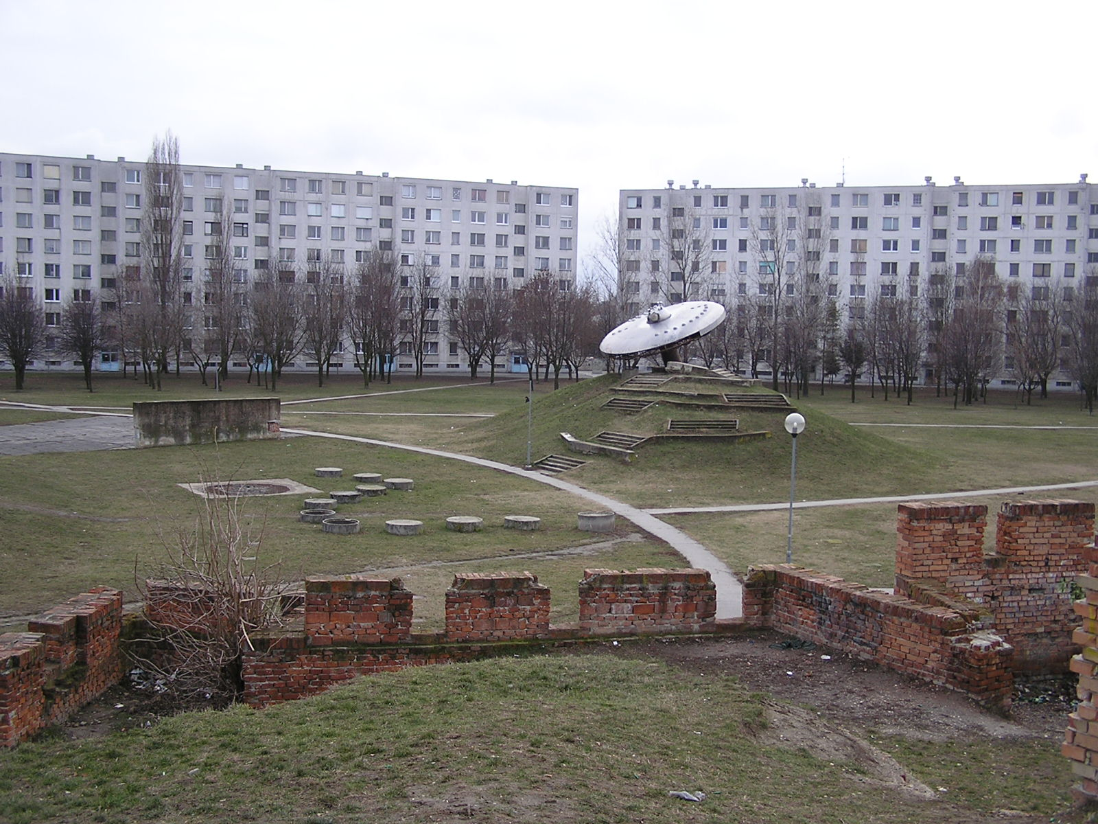 Lietajúci tanier v parku na Bieloruskej ulici v Bratislave